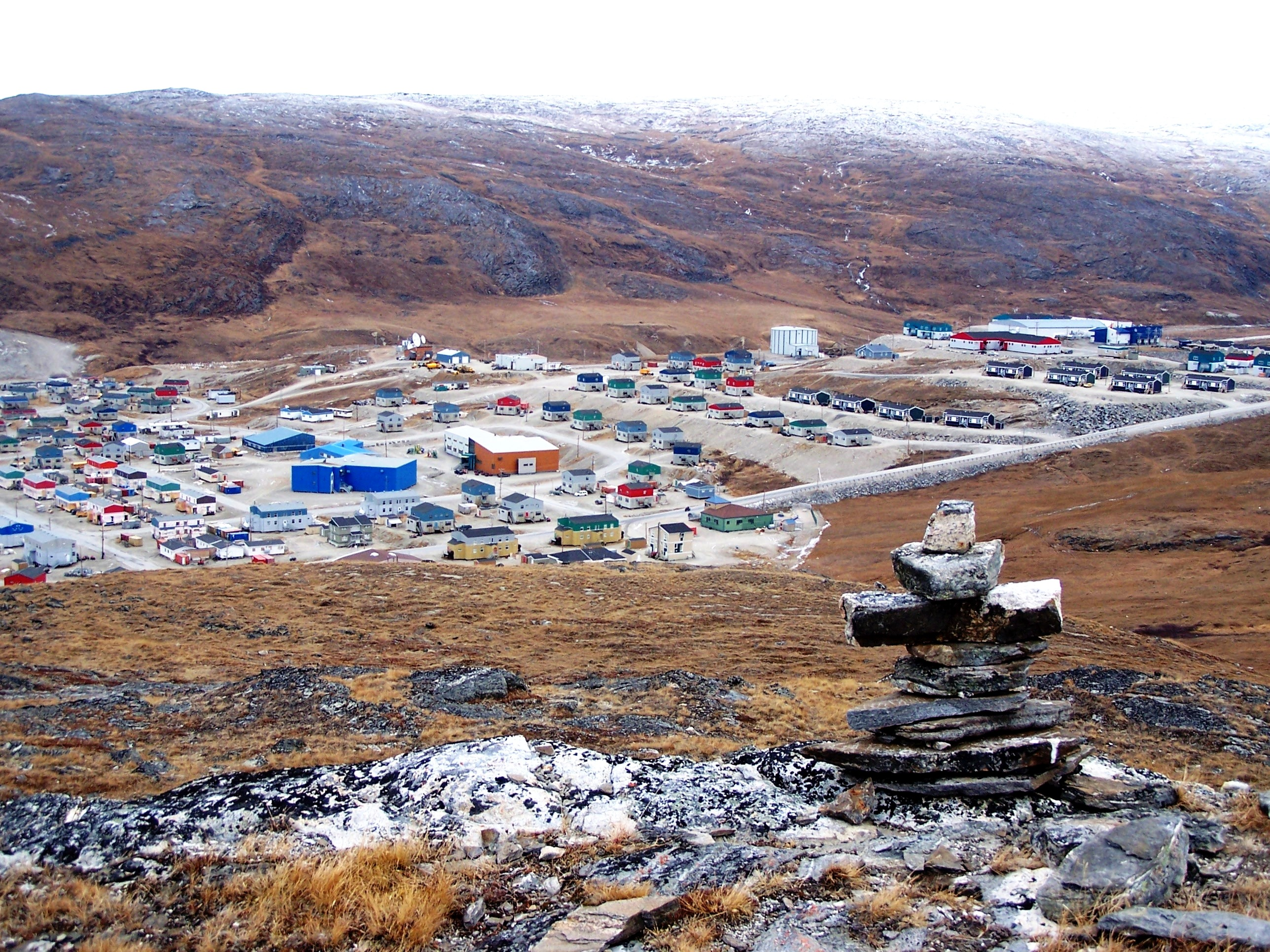 Vue générale de Salluit